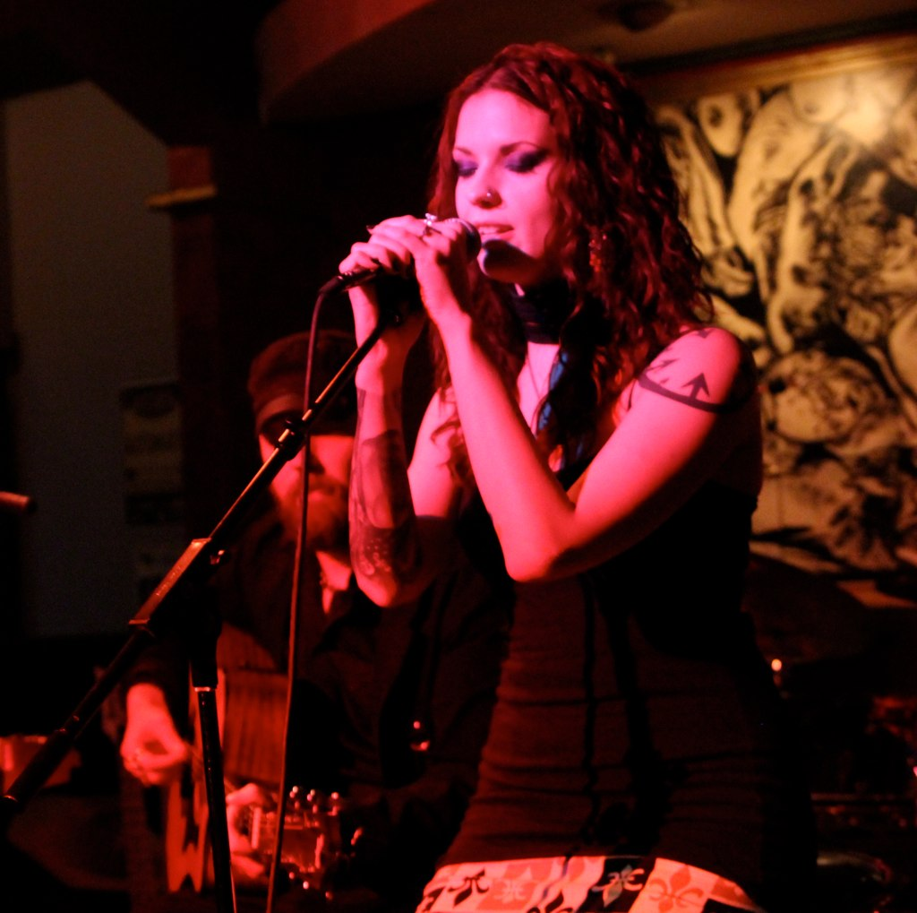 Brittany Bindrim вокалистка группы I:Scintilla